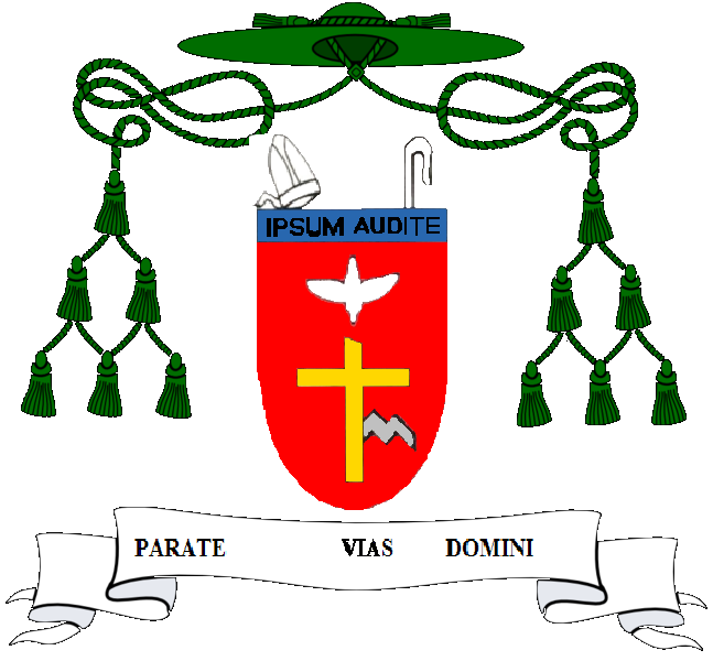 Escudo de monseñor Juan María Leonardi Villasmil. Obispo de Punto Fijo